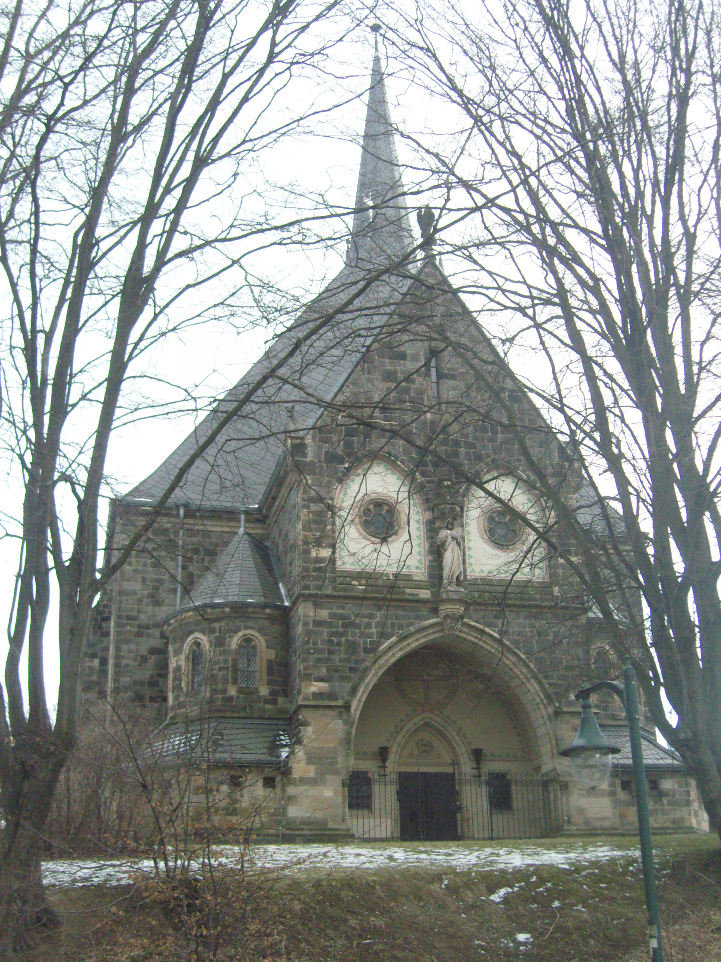 Evangelische St.-Jacobi-Kirche (Neustadt in Sachsen)